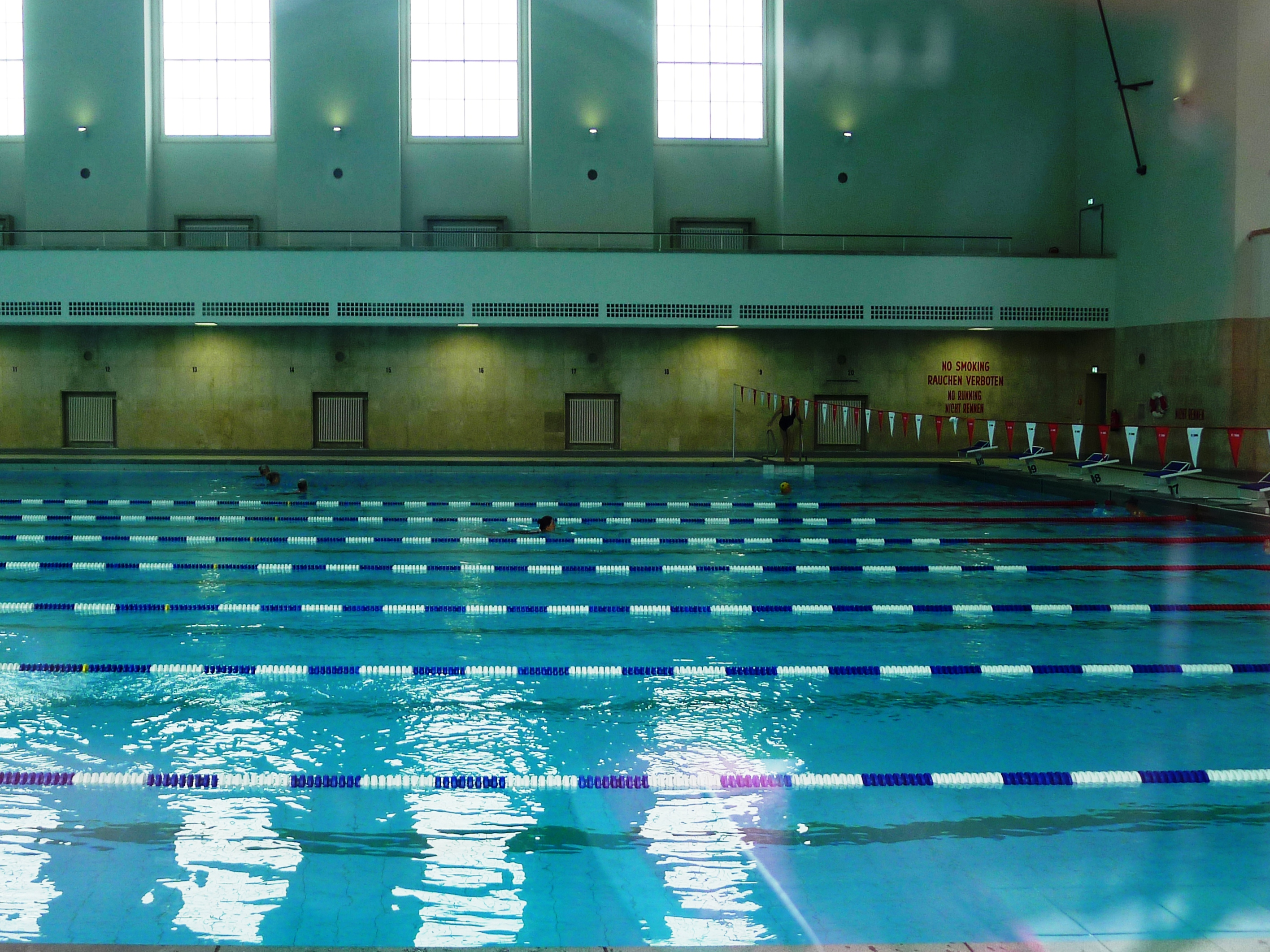 Blick durch ein Fenster auf das Schwimmbecken